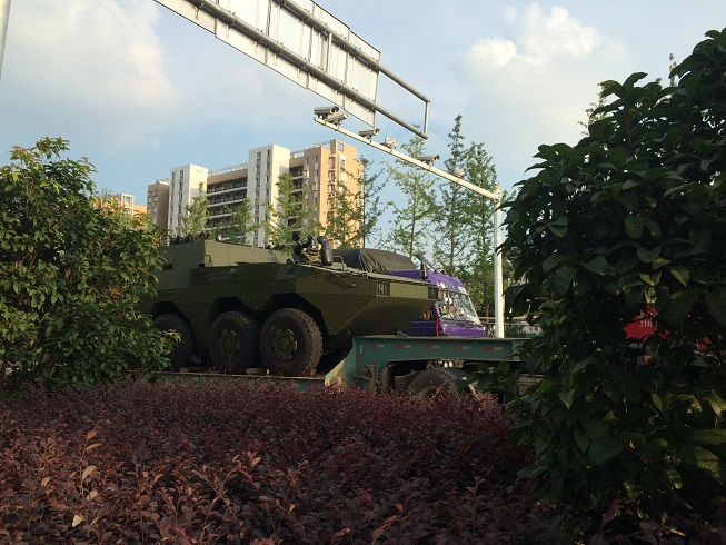 南京石杨路拍摄的运输中军用装甲车